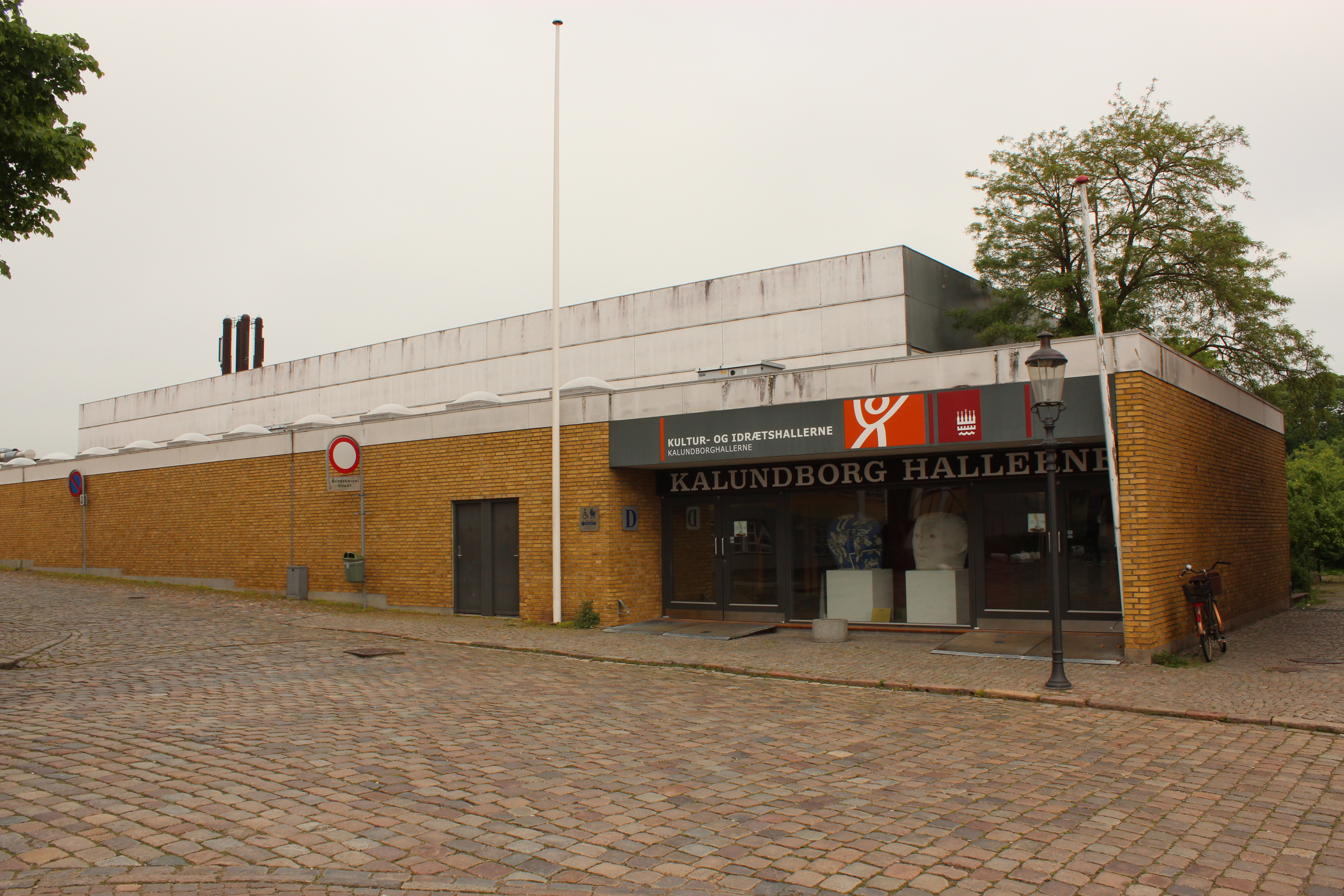 Sportshaller